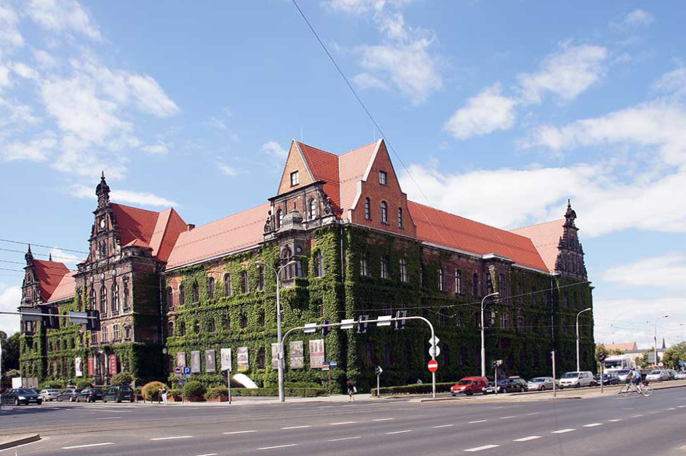 Wrocław Stare Miasto, pl. Powstańców Warszawy 5 - Muzeum Narodowe, dawny gmach Zarządu Prowincji (zabytek nr A/5258/325/Wm)